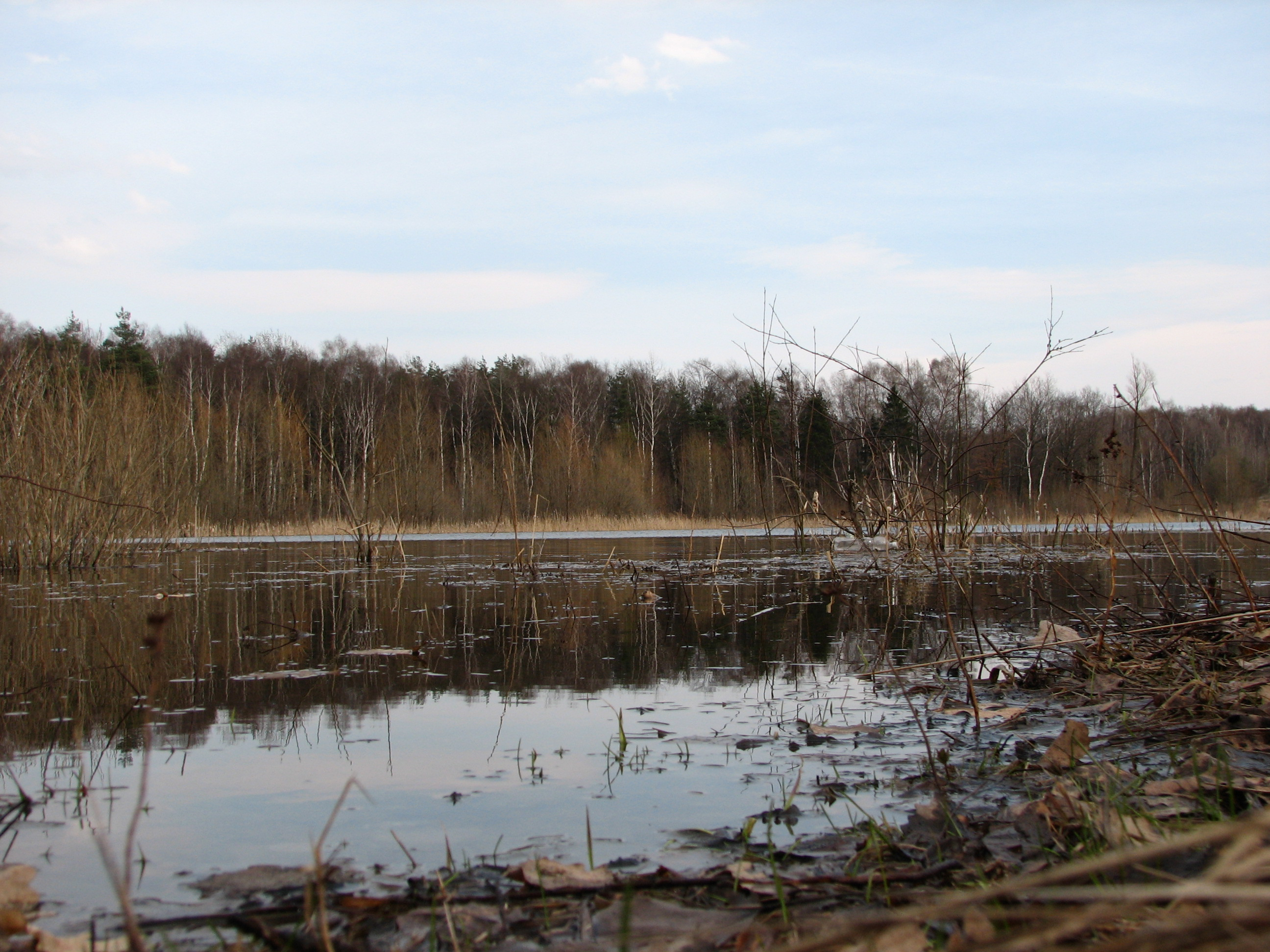 Staw powstały przez szkody górnicze w Sosnowcu